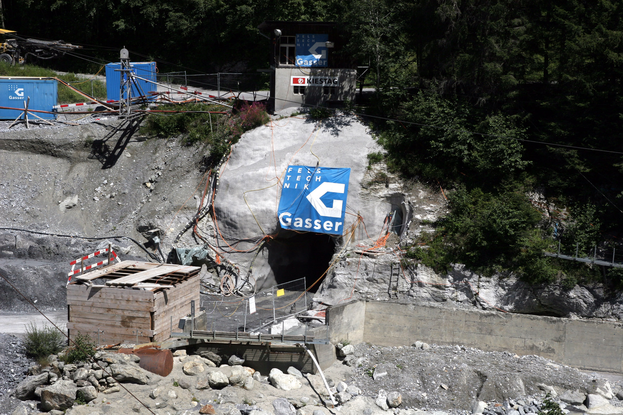 Der Abfluss des Gletscherrandsees des Unteren Grindelwaldgletschers.